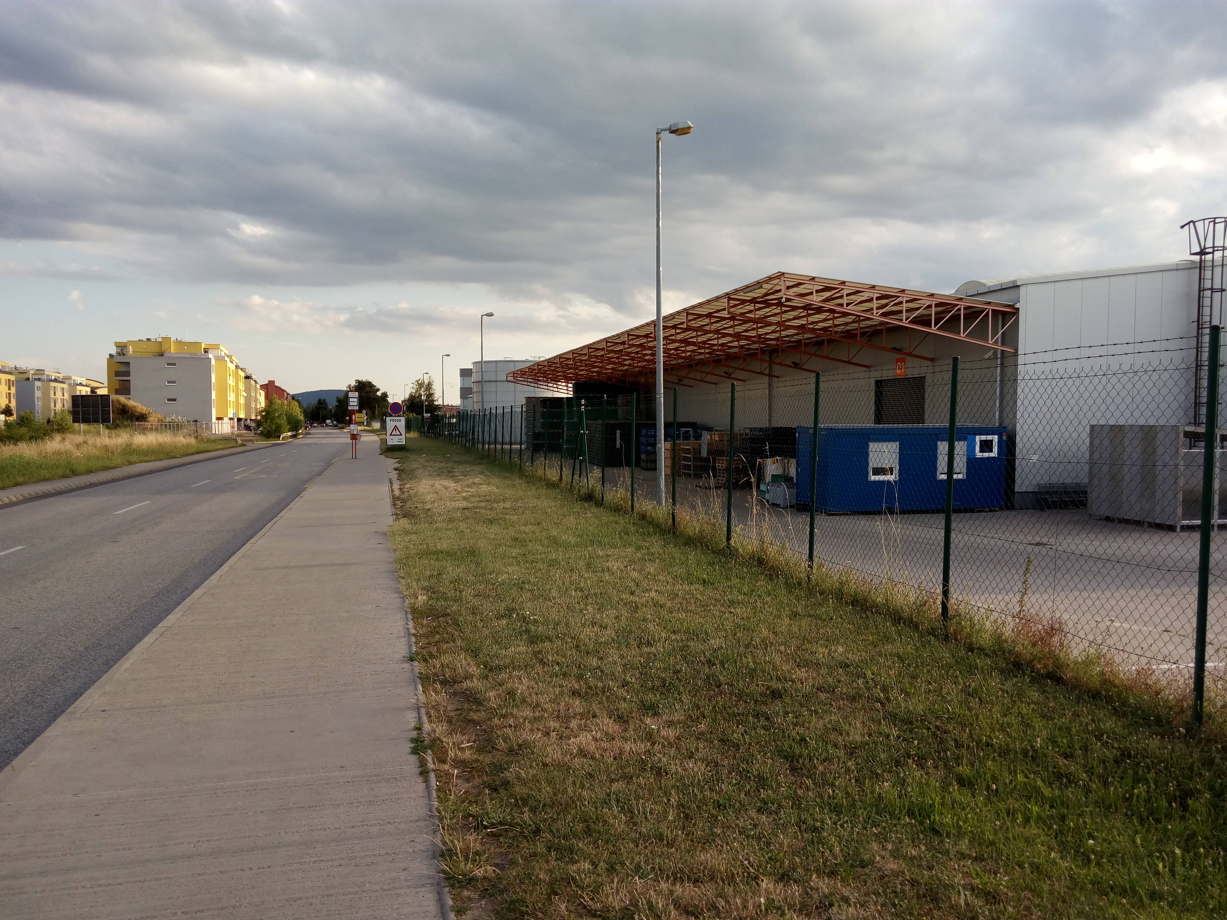 Opletalova, Devínska Nová Ves, Bratislava